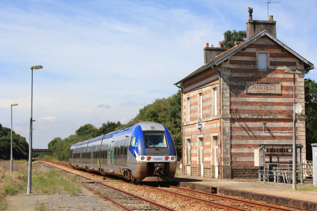 L'ancien bâtiment voyageurs de la gare d'Hanvec avec un train (AGC) sans arrêt